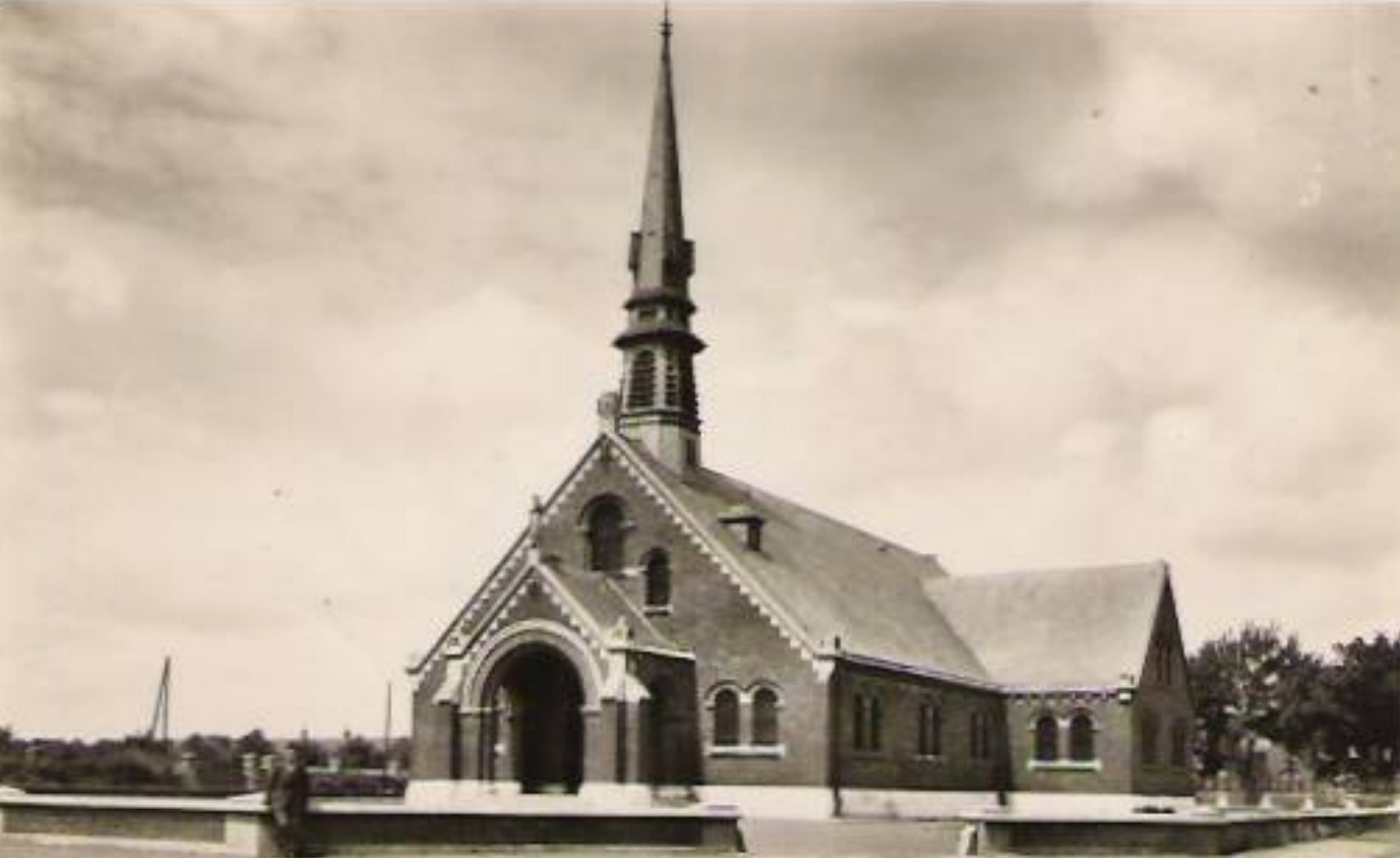 Église Saint-Louis des cités de la fosse n° 5 - 5 bis de la Compagnie des mines de Béthune dans le bassin minier du Nord-Pas-de-Calais, Grenay, Pas-de-Calais, Nord-Pas-de-Calais, France. L'architecte est Gustave Umbdenstock, mort le 16 novembre 1940. L'église Saint-Louis est inscrite aux monuments historiques depuis le 9 octobre 2009 et est inscrite sur la liste du patrimoine mondial par l'Unesco le 30 juin 2012 et y constitue en partie le site no 84.